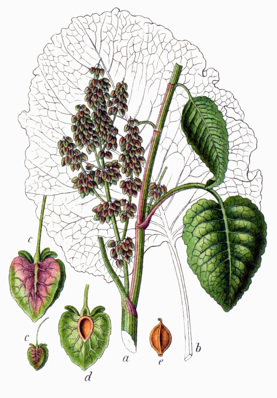 Rumex alpinus sensu L. 1759 (Syst. Nat., ed. 10, 2: 990) non L. 1753 (nom. ambig.), syn. Rumex pseudoalpinus Höfft Original Description Alpen-Mönchsrhabarber, Rumex alpinus